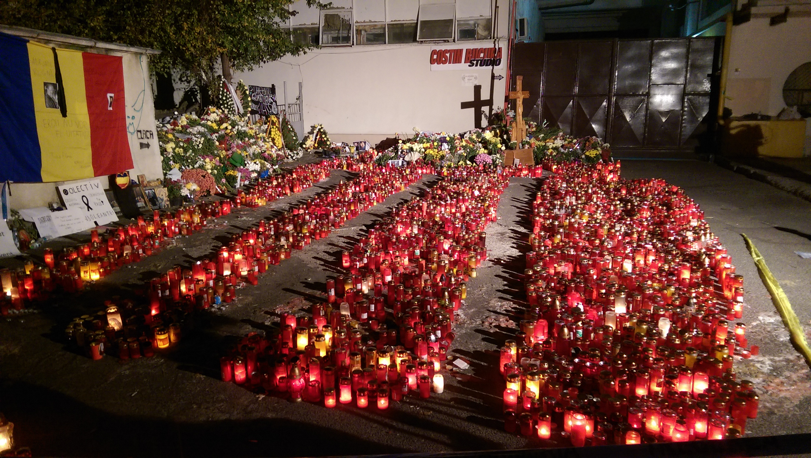 Lumanari in fata clubului Colectiv, 5 noiembrie 2015